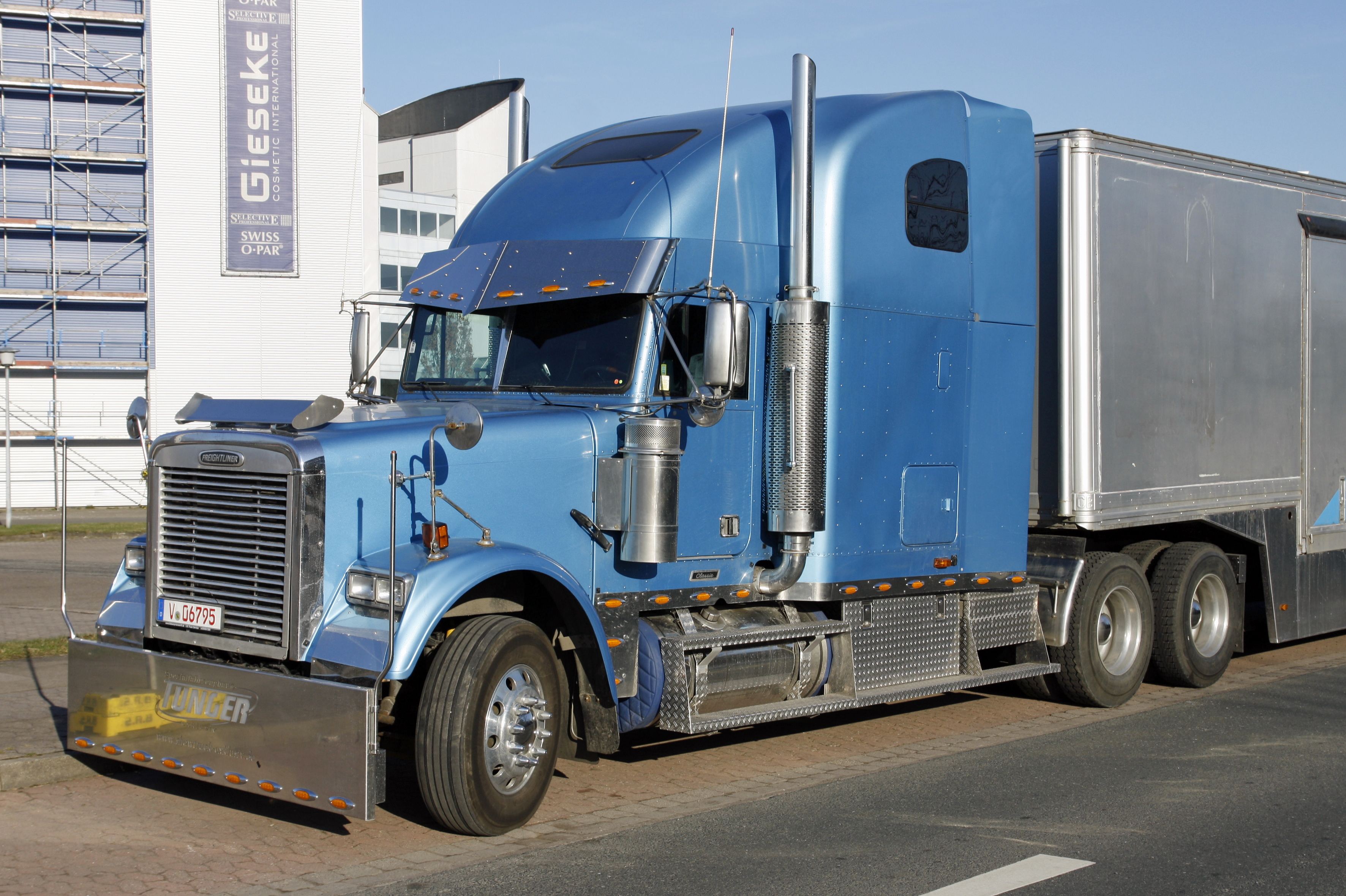 Hannover / Ger 21-03-09